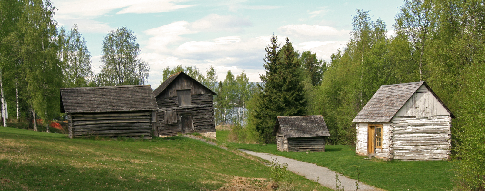 Norsk utvandrermuseum / Norwegian Emigrant Museum, Stange, Norway.